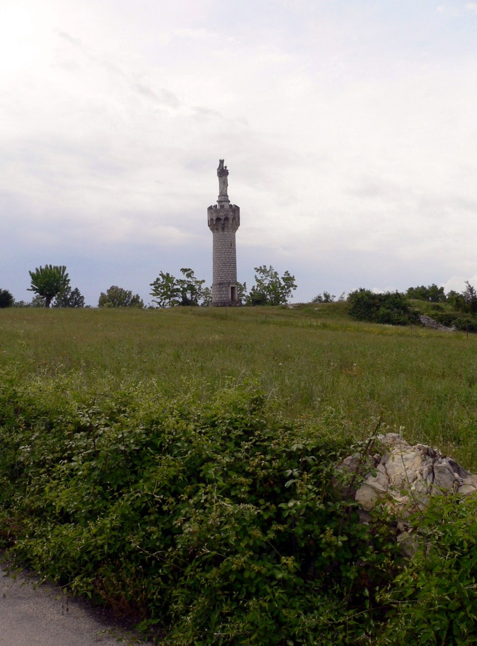 Tour et statue érigées au XIXème siècle.